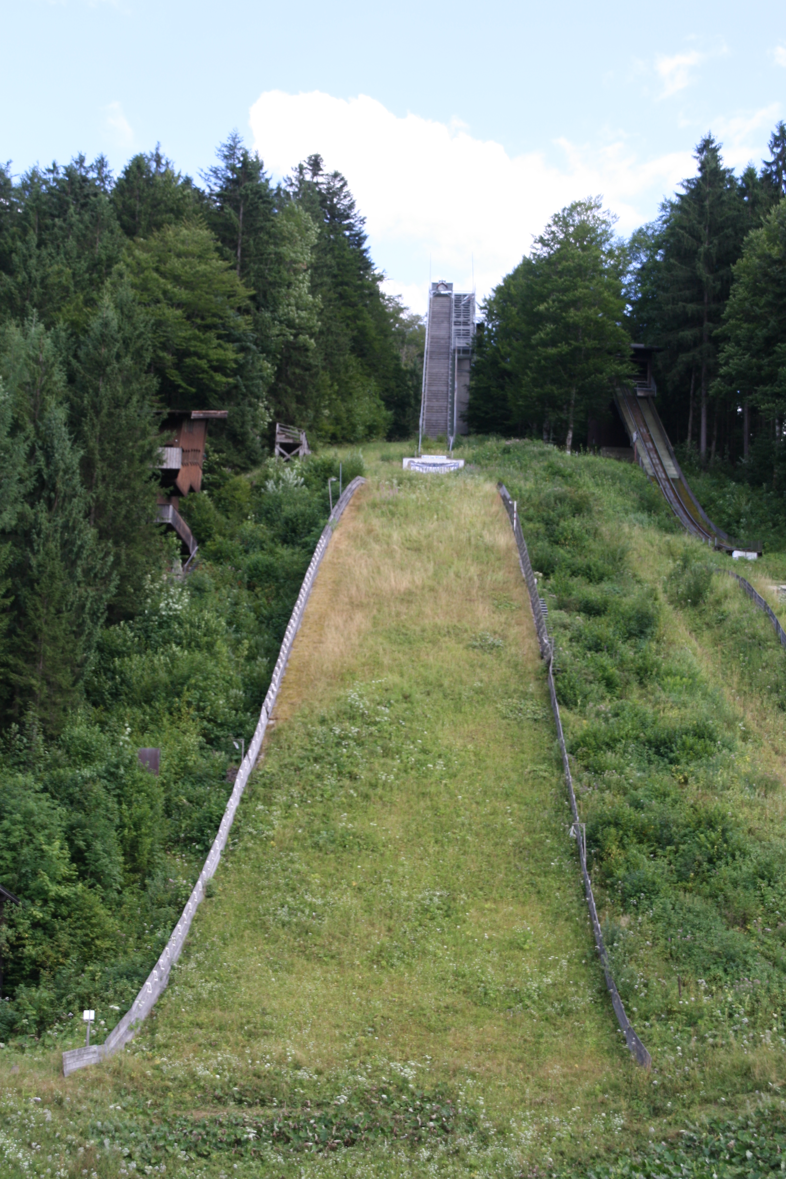 Franz-Haslberger-Schanze, Teil der Reit-im-Winkl-Schanzen